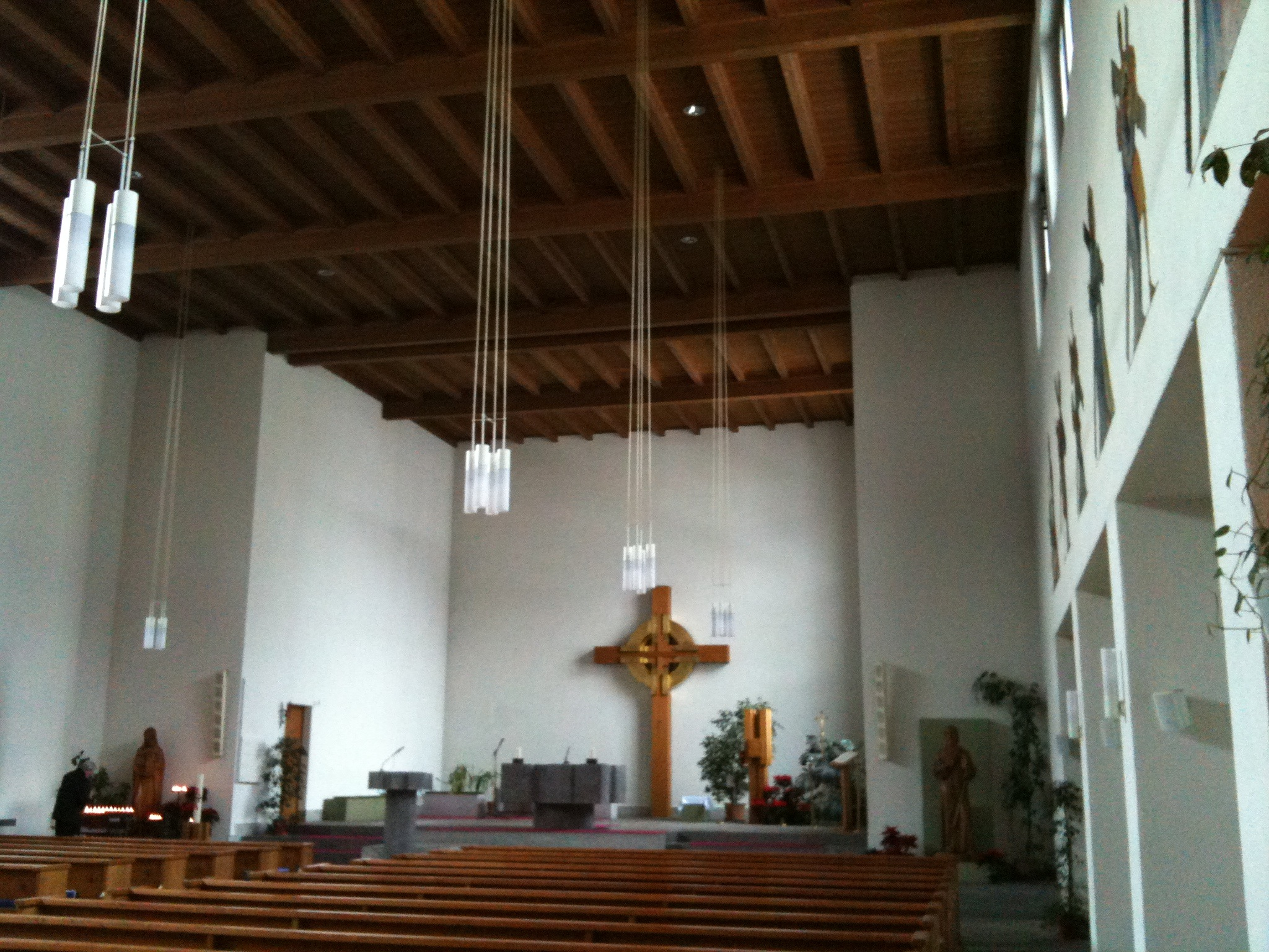 römisch-katholische Erlöserkirche in Chur